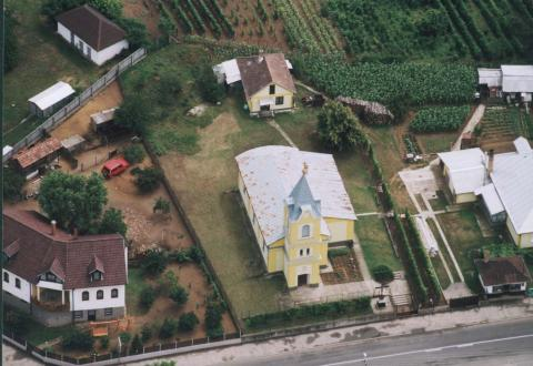 Nyírábrány Hungary aerialphotography